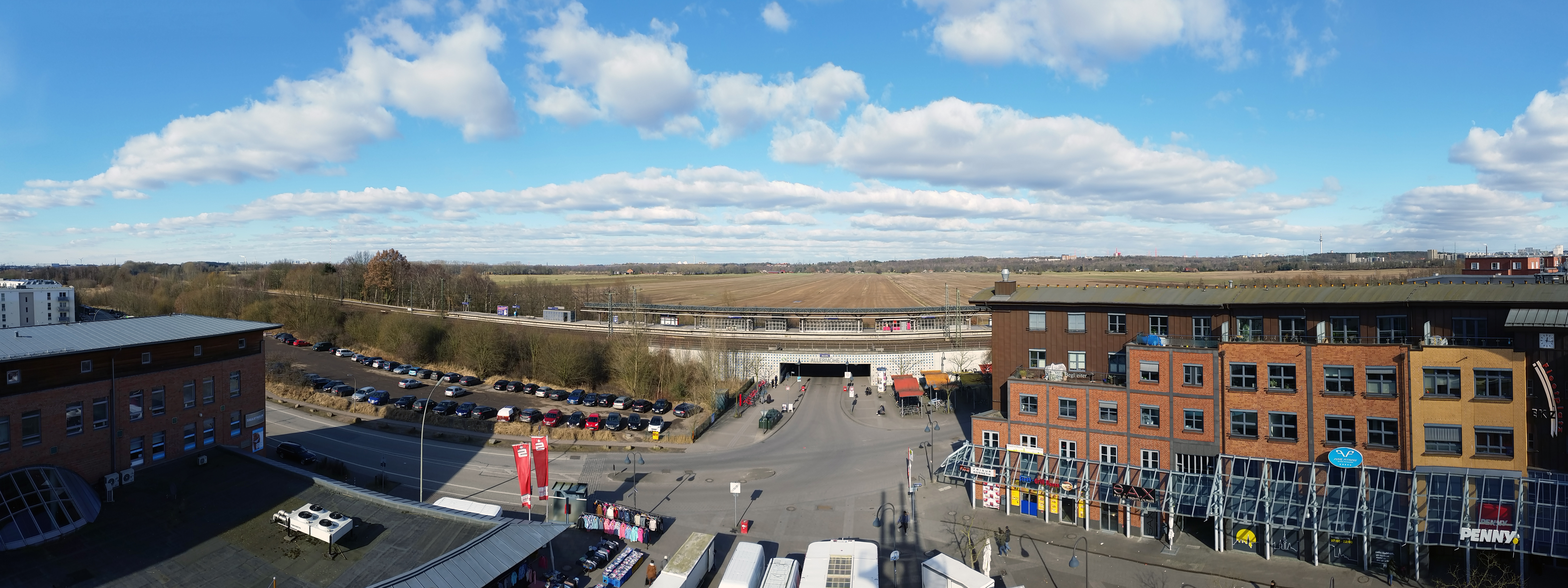 Dieses Bild wurde auf dem Aussichtsturm am Fleetplatz in Neuallermöhe bzw. bei der S-Bahnstation Allermöhe aufgenommen. Die Blickrichtung dürfte etwa Richtung Norden bzw. Nordnordost sein. Zu sehen ist der Bahndamm der S-Bahn-Linie 21 mit dem Bahnhof Allermöhe sowie den dahinterliegenden Äckern. Dieses Bild ist eine Abwandlung des Bildes unter bzw.